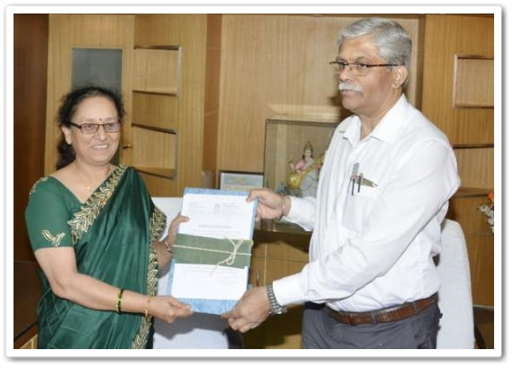 मृणालिनी फडणवीस यांनी घेतला सोलापूर विद्यापीठाच्या कुलगुरू पदाचा पदभार